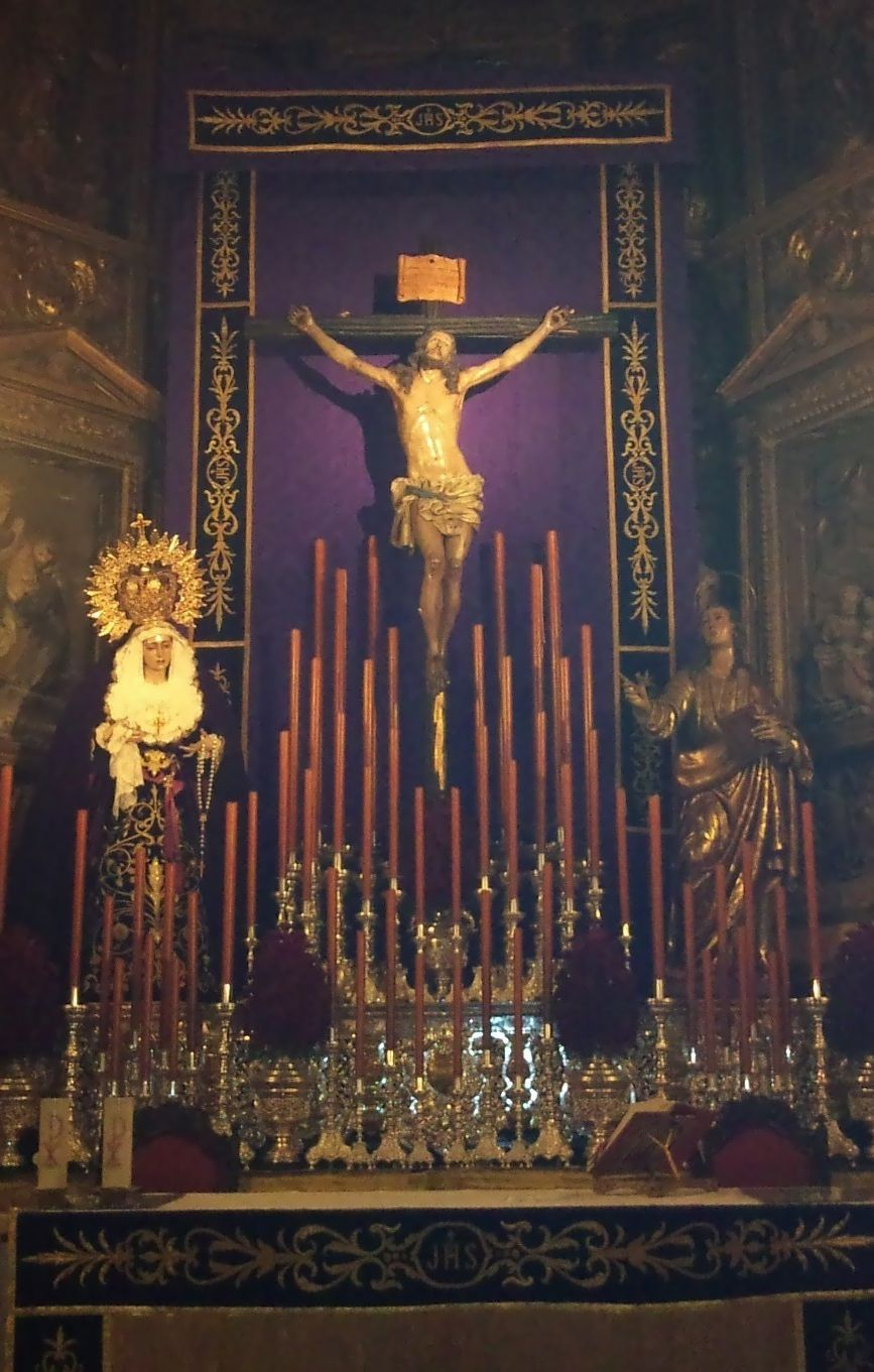 Altar de cultos del septenario de la Hermandad de la Expiración en la Iglesia de San Bartolomé de Jaén.